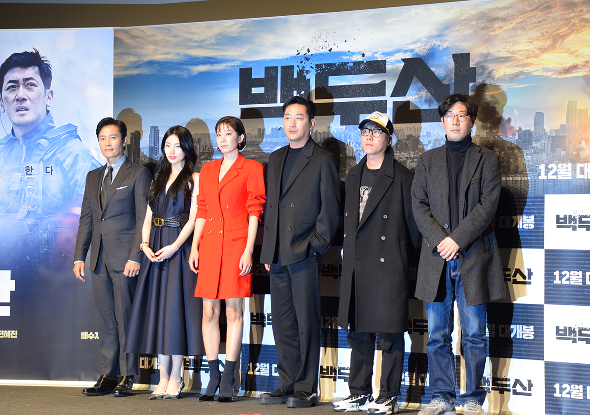 영화 '백두산' Mount Paektu 제작보고회 현장 (2019.11.19)